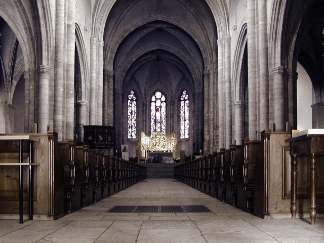 Cathédrale Notre de Dame de Sion (Suisse)